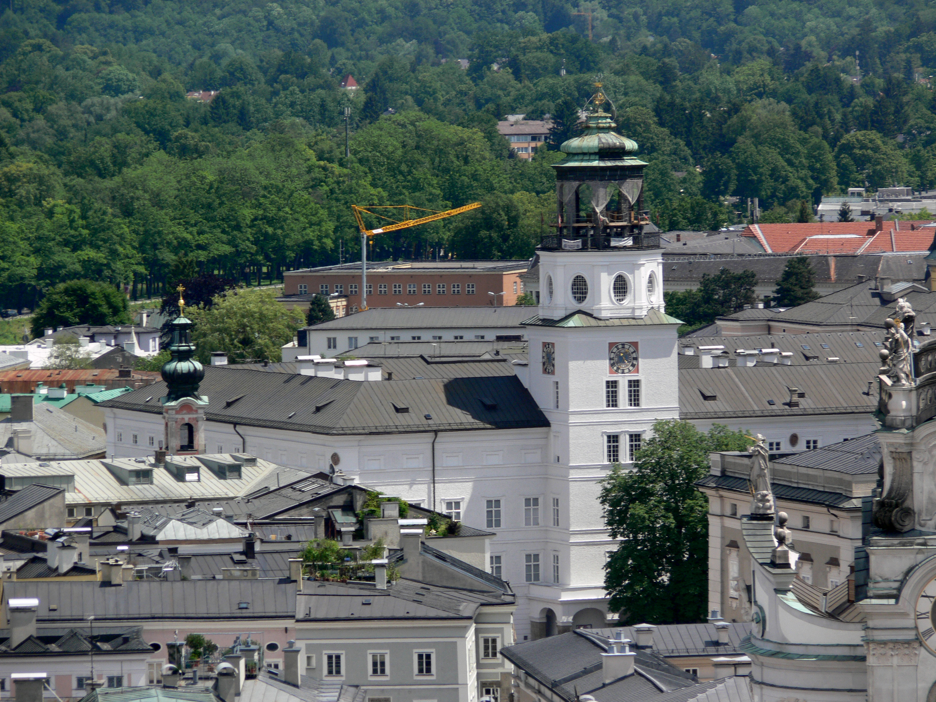 Salzburg, Aussicht vom Mönchsberg Neue Residenz